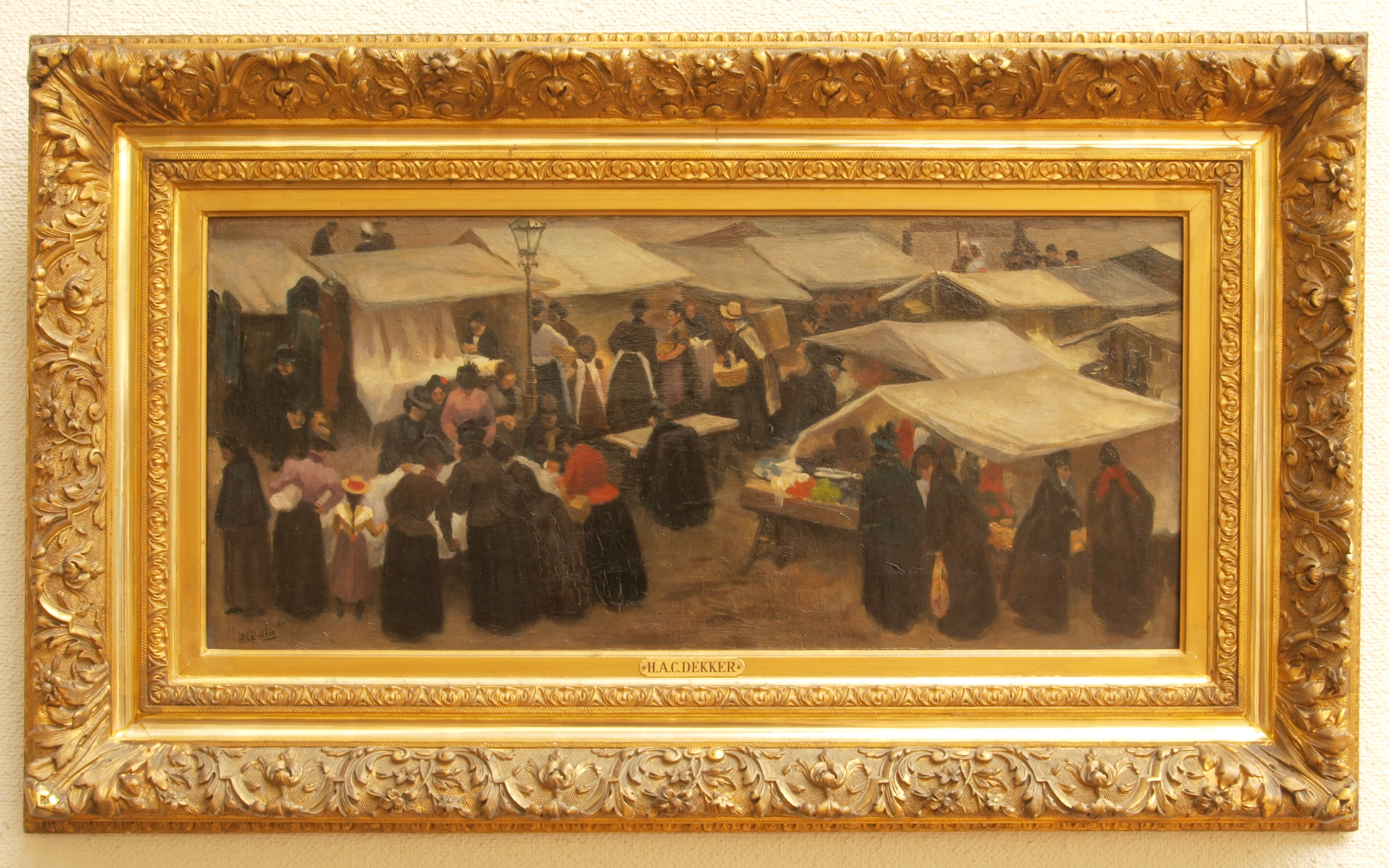 Hendrik Adriaan Christiaan Dekker (1836-1905), Nieuwmarkt te Amsterdam, waarschijnlijk 1897, Olieverf op doek.